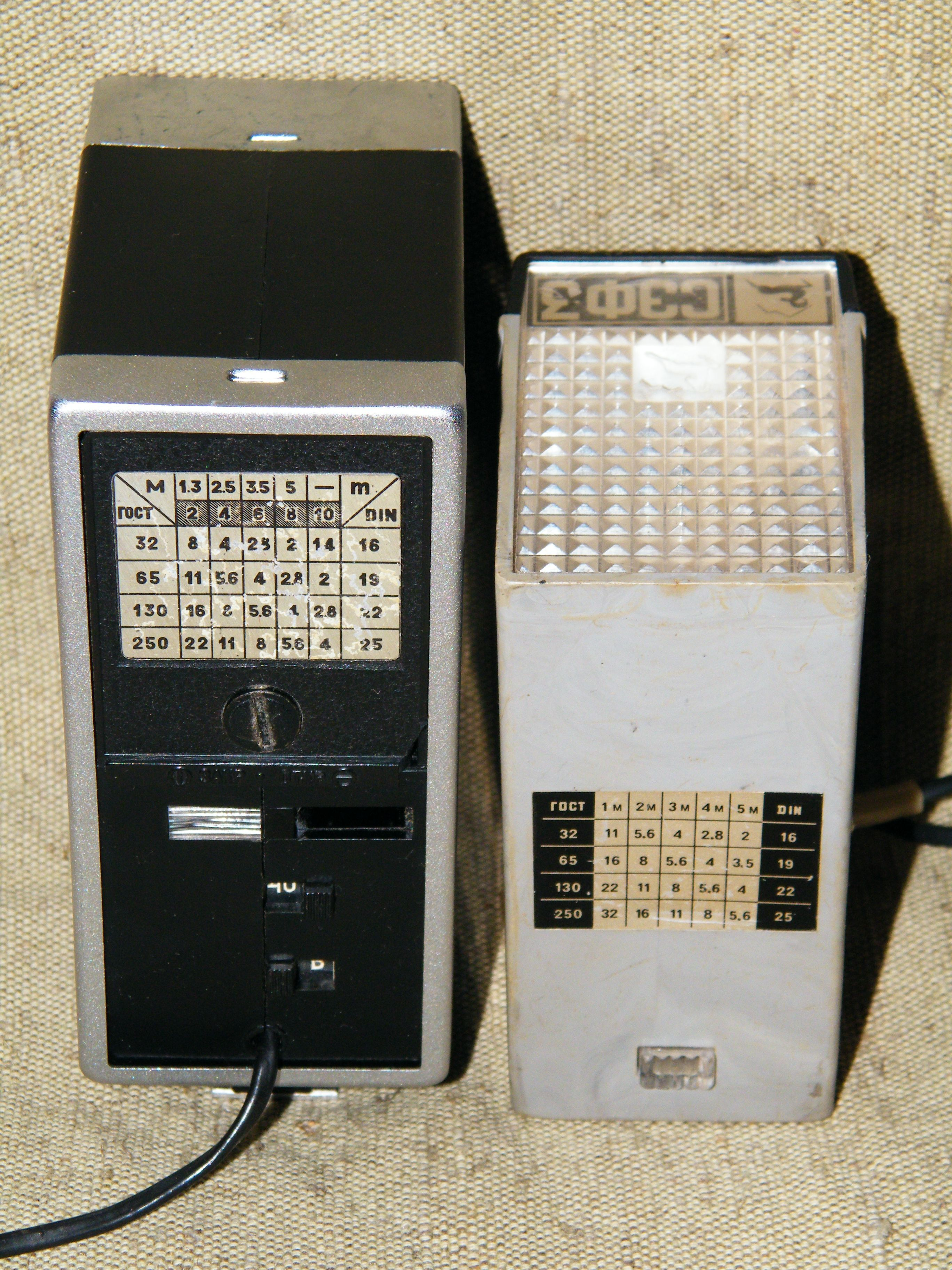 Советские фотовспышки Электроника Л5-01 и СЭФ-3